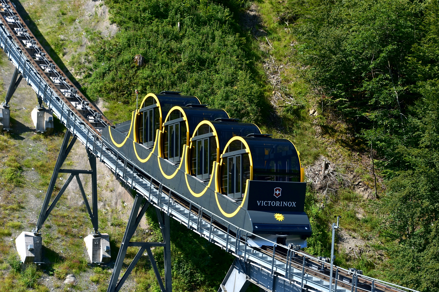 Funiculaire Schwyz-Stoos arrivant à la station inférieure.